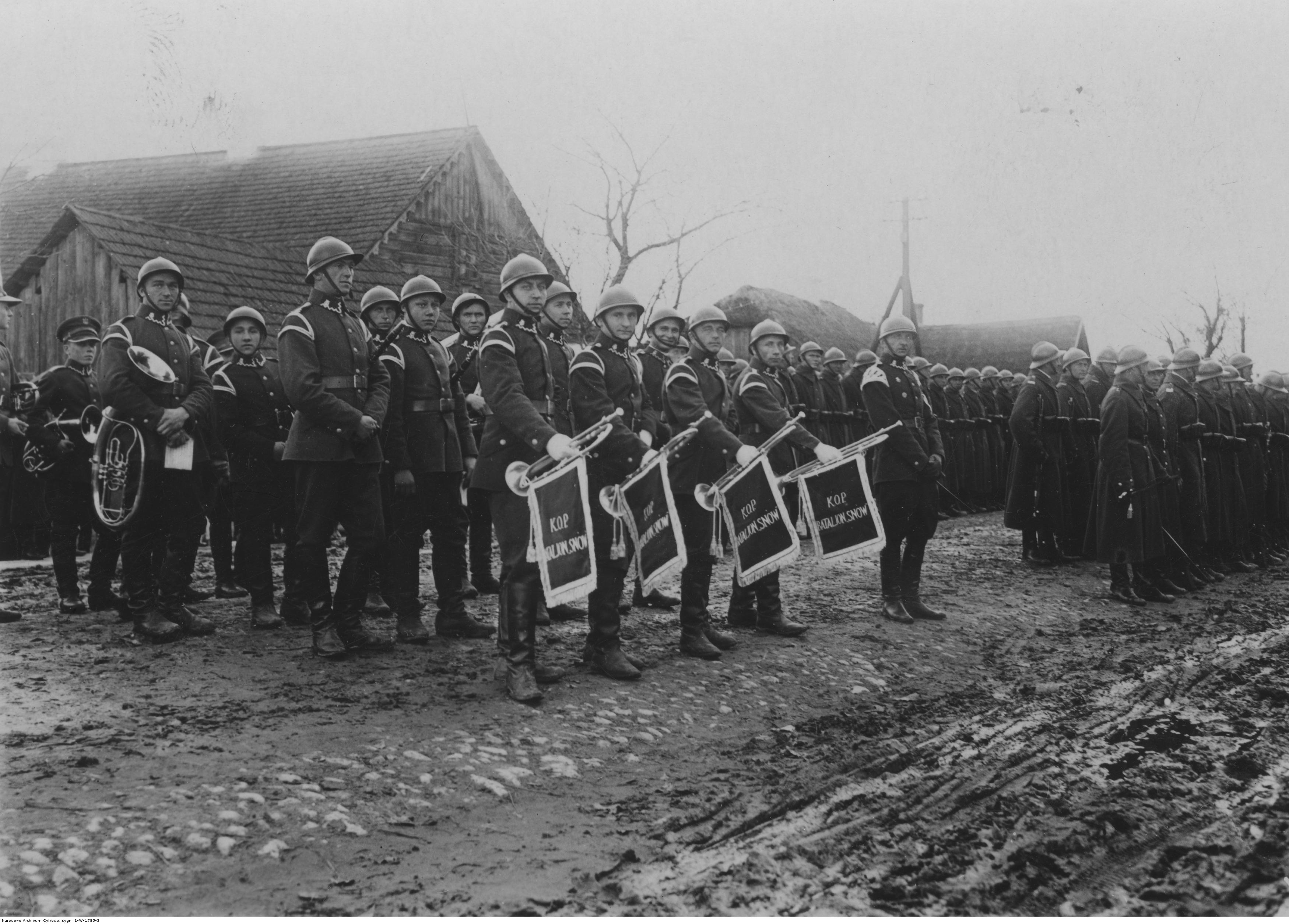 Obchody X- lecia istnienia Korpusu Ochrony Pogranicza w Batalionie KOP "Snów"; fanfarzyści batalionu z nowymi fanfarami, darem miejscowej ludności.